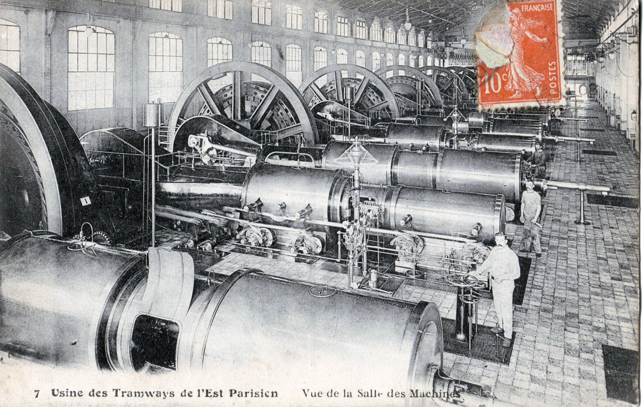 Carte postale ancienne, éd. Imp La Photo : salle des dynamos de l'usine de production d'électricité de la Cie des Tramways Est Parisien